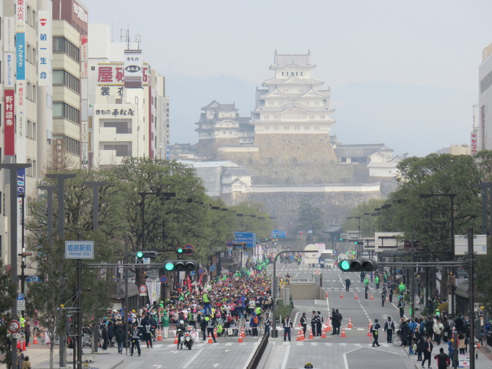 姫路城マラソンのスタート周辺。（平成２８年）